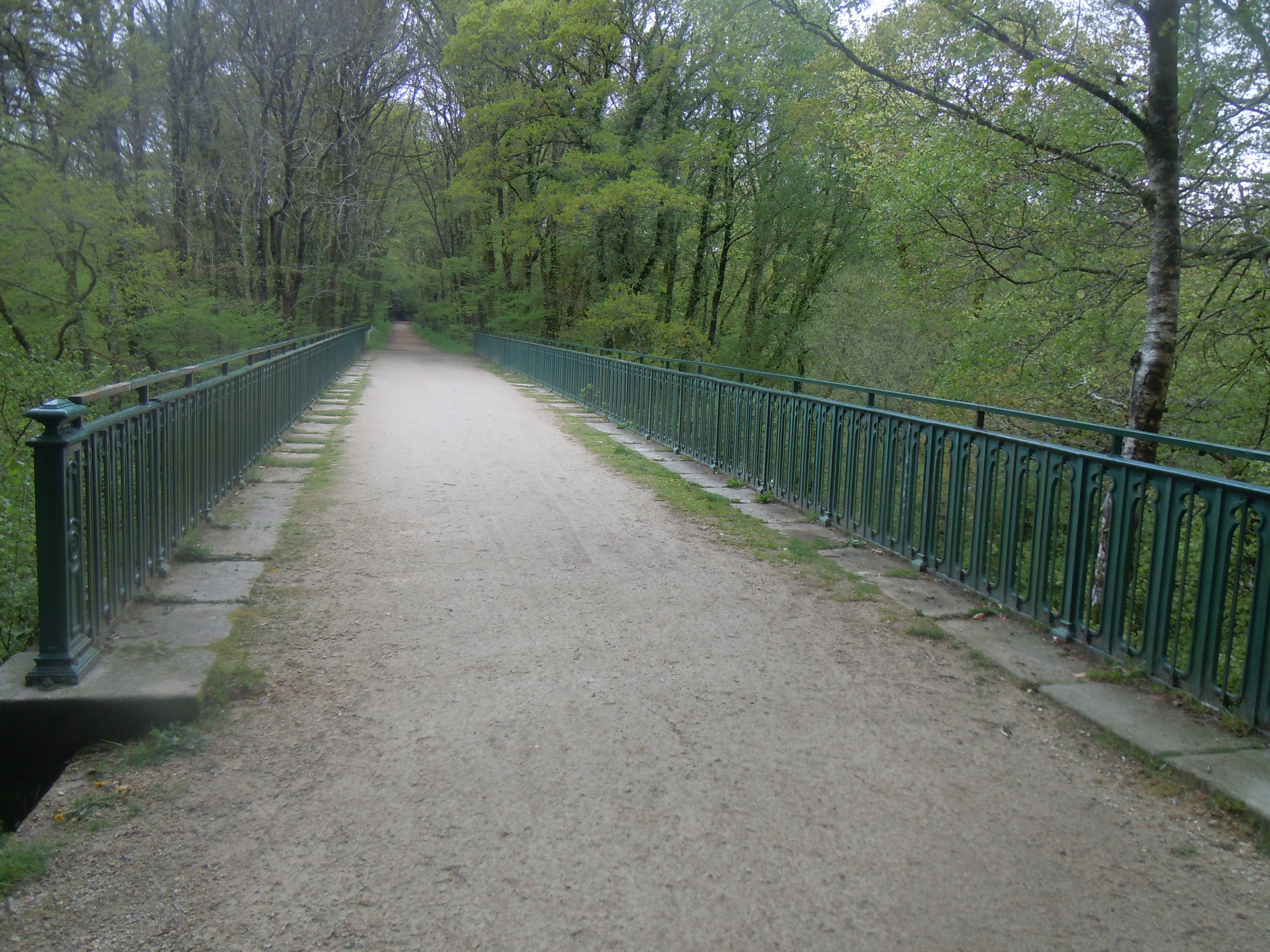 le pont Kerninon de l'ancien réseau breton à Scaër (Finistère)